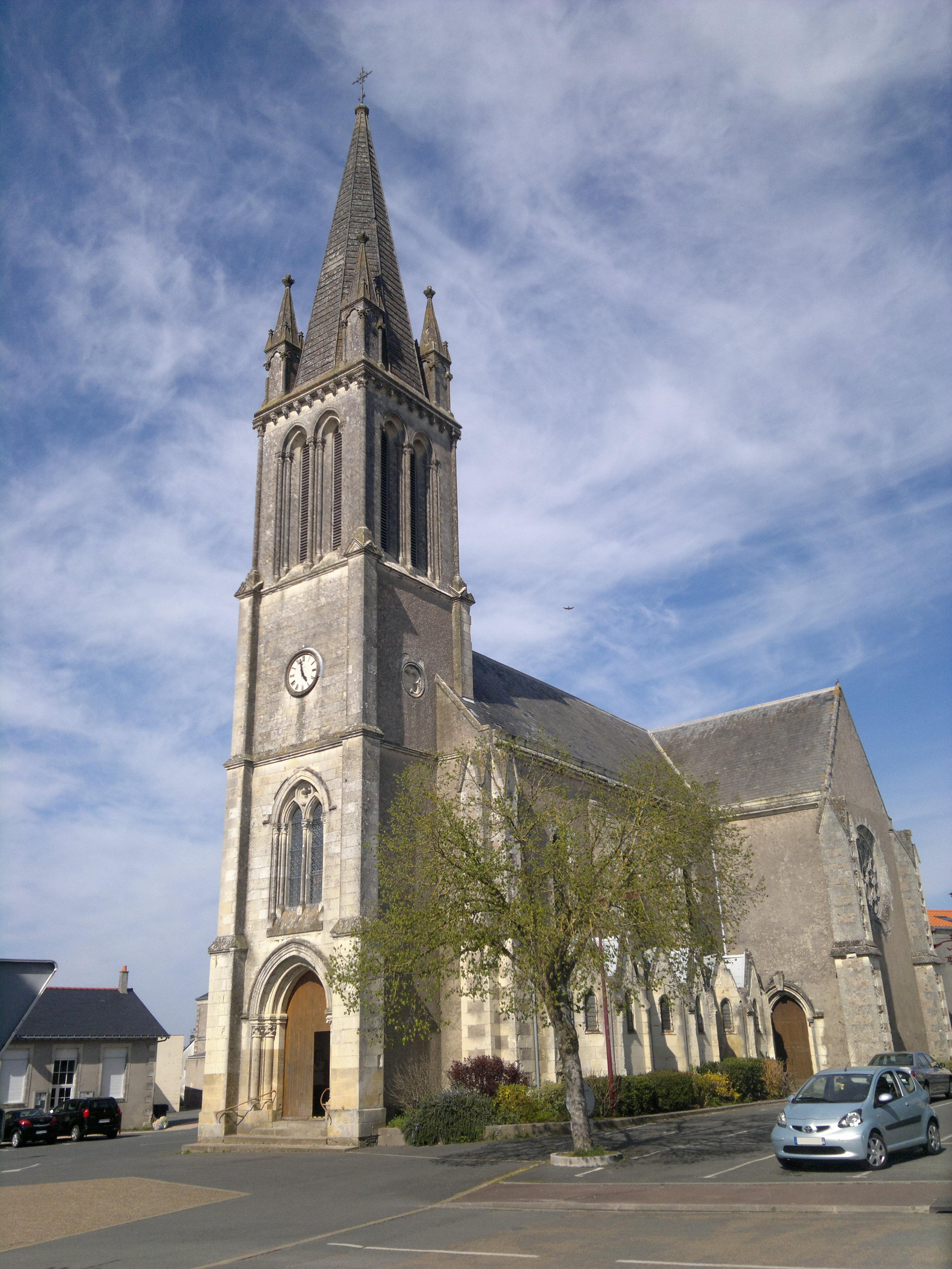 Église, Fr-49-Le Marillais.